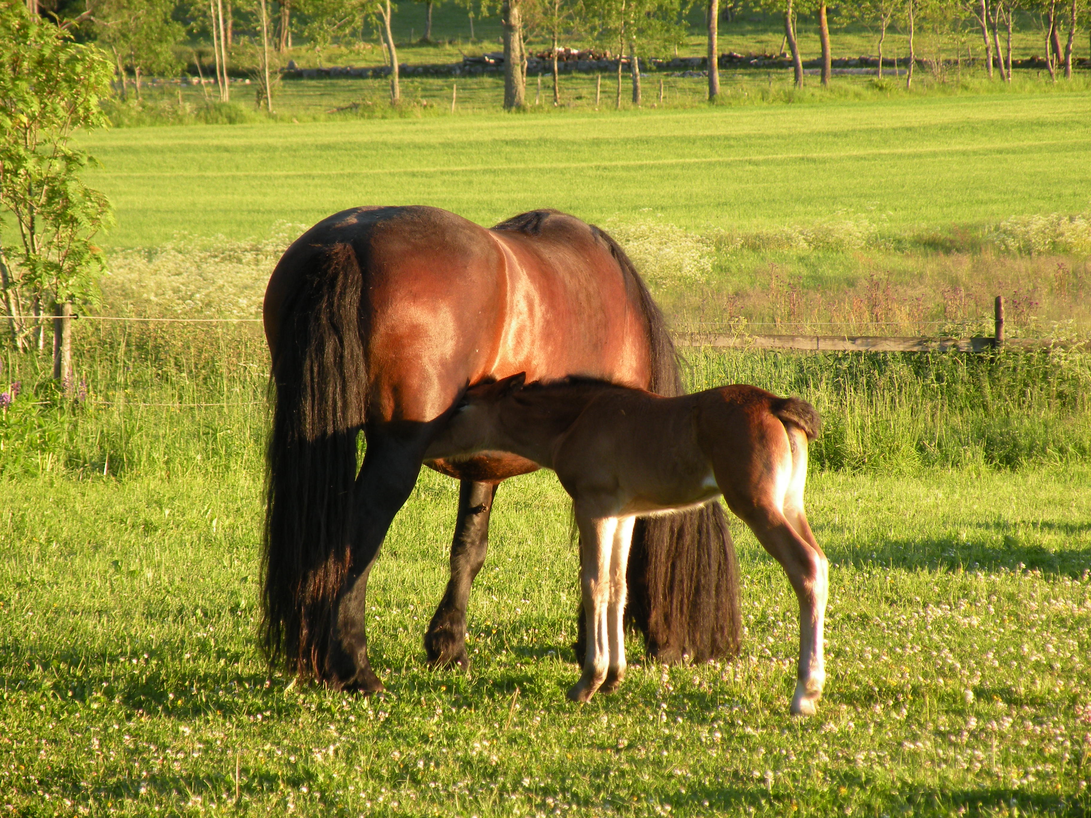 Nordsvensk häst